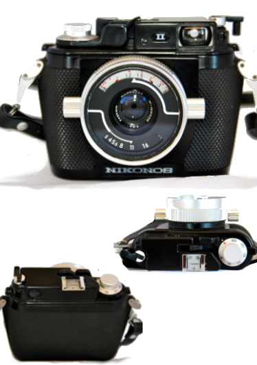 Nikonos II, three views